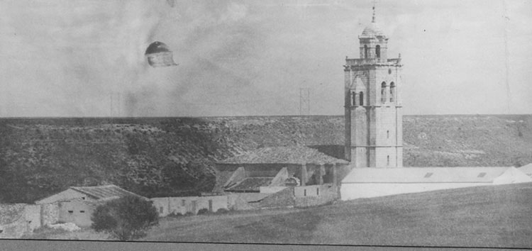 Iglesia. Torre - Ciguñuela (Valladolid) - Álbum 200 x 140 - Fotografía. Papel 135 x 55 B/N